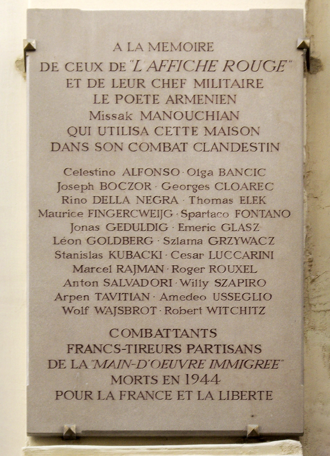 Plaque commémorative, 19 rue au Maire, Paris 3e.« À la mémoire de ceux de L'Affiche rouge et de leur chef militaire le poète arménien Missak Manouchian qui utilisa cette maison dans son combat clandestin, Celestino Alfonso, Olga Bancic, Joseph Bogzor, Georges Cloarec, Rino Della Negra, Thomas Elek, Maurice Fingercweijg, Spartaco Fontano, Jonas Geduldig, Emeric Glasz, Leon Goldberg, Szlama Grzywacz, Stanislas Kubacki, Cesar Luccarini, Marcel Rajman, Roger Rouxel, Anton Salvadori, Willy Szapiro, Arpen Tavitian, Amadeo Usseglio, Wolf Wajsbrot, Robert Witchitz, combattants francs-tireurs partisans de la Main-d'œuvre immigrée, morts en 1944 pour la France et la liberté. »